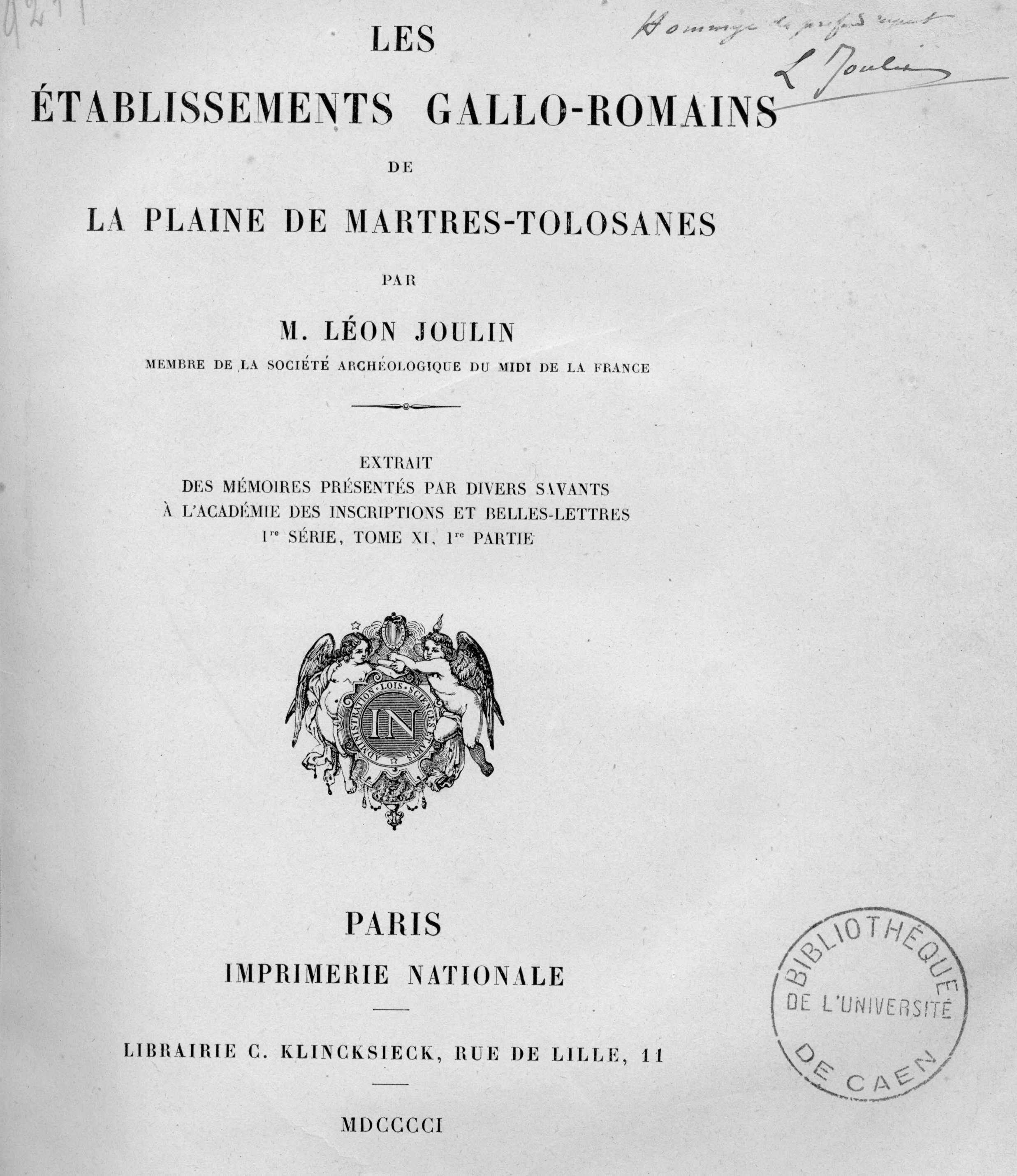 Frontispice du livre de Joulin, 1901